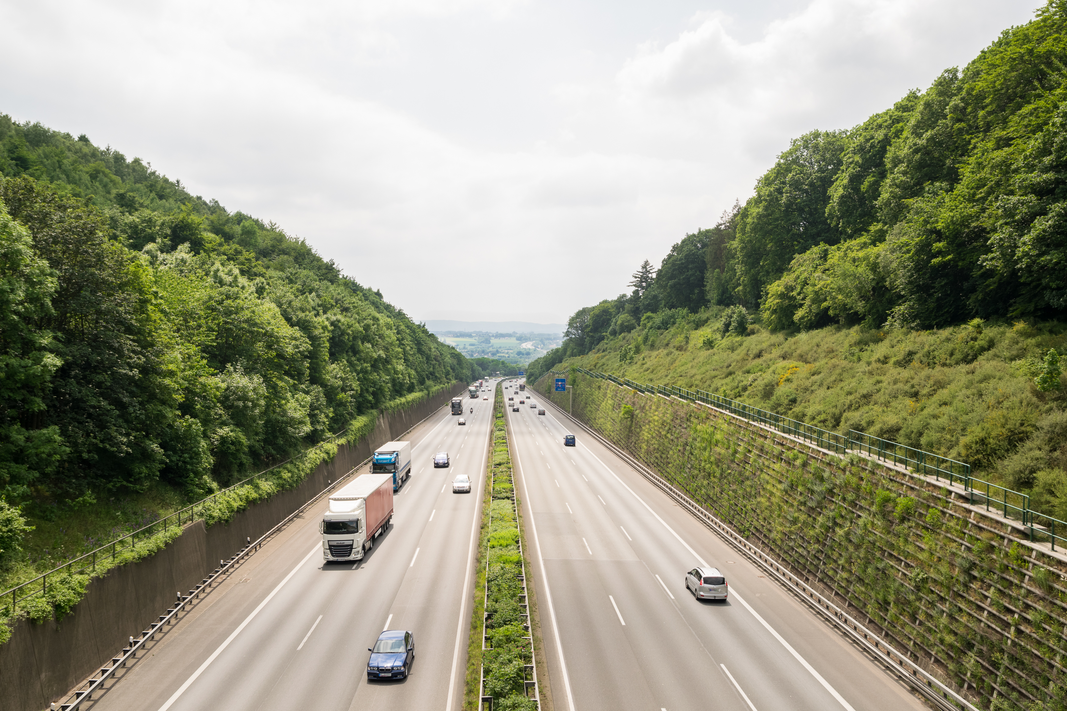 Autobahn A2 von der Brücke zwischen Stuckenberg (Herford) und Obernberg (Bad Salzuflen)